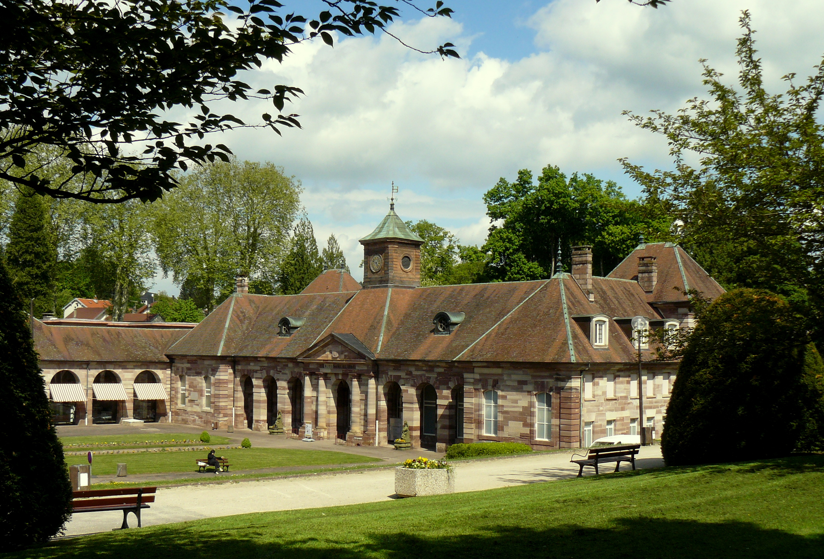 Les Thermes de Luxeuil-les-Bains (Haute-Saône, France)